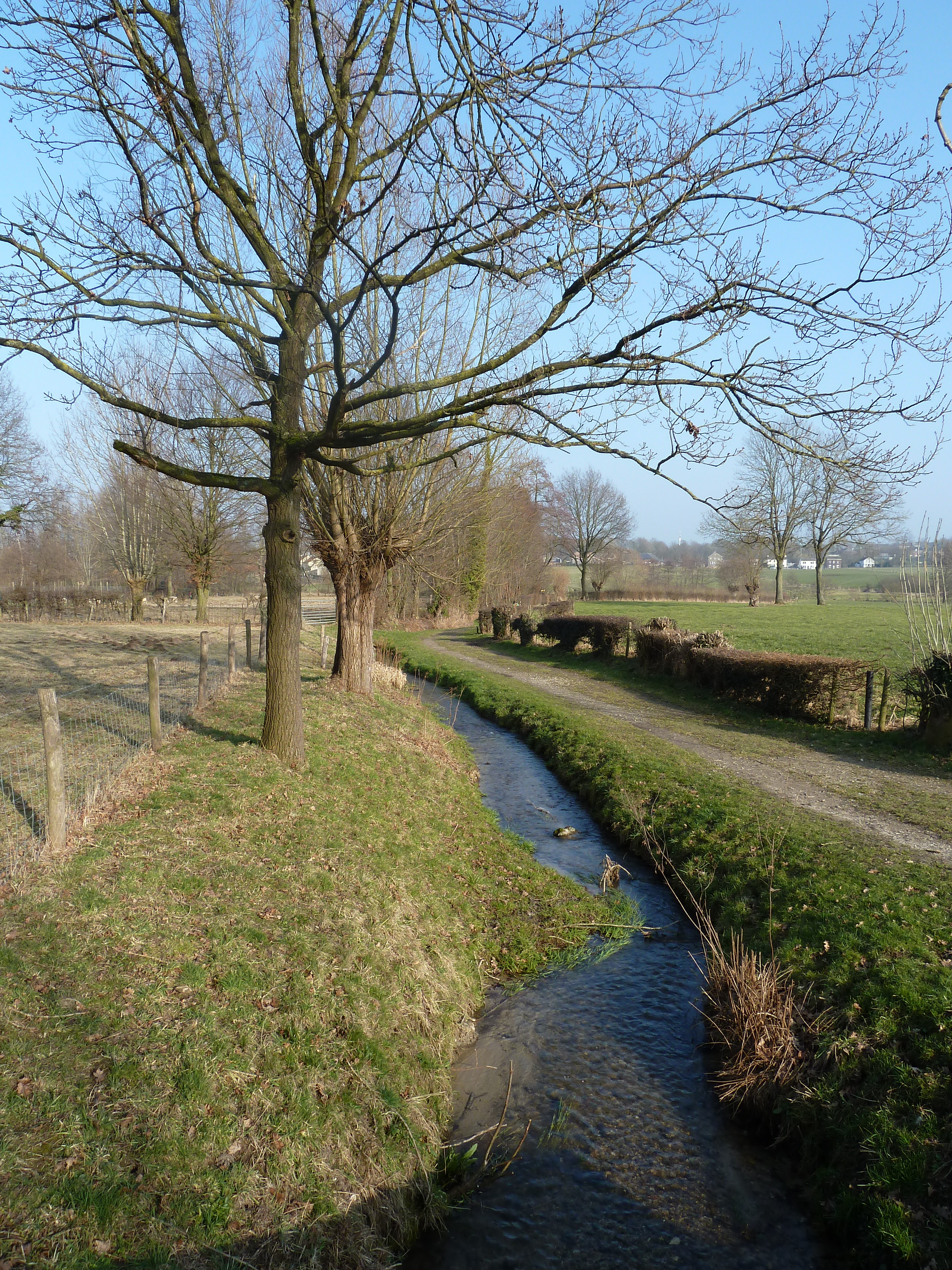 Landeus bij Mechelen, Gulpen-Wittem, Limburg, Nederland